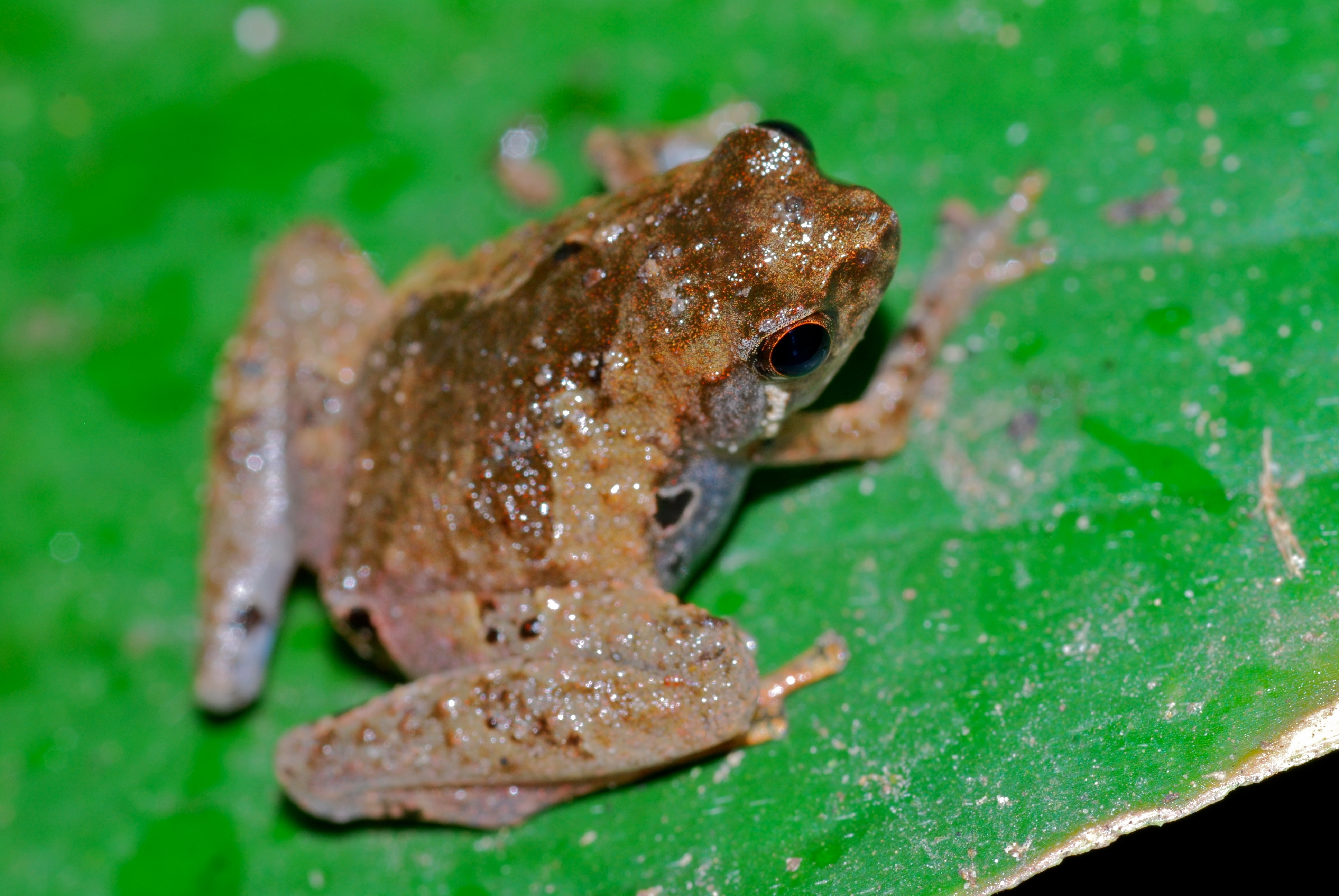 Bilit, Sabah, MALAYSIA